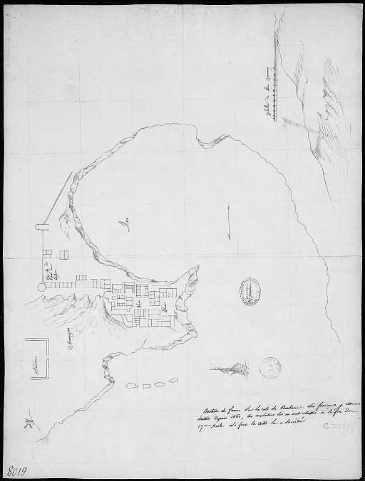 Carte de l'ancienne colonie française en Afrique du Nord nommée Bastion de France. "Bastion de France, dans la côte de Barbarie. Les Français y étaient établis depuis 1560, les -illisible- (musulmans? populations?) les en ont chassé à la fin du 17e siècle. Le Fort de la Calle lui a succédé."